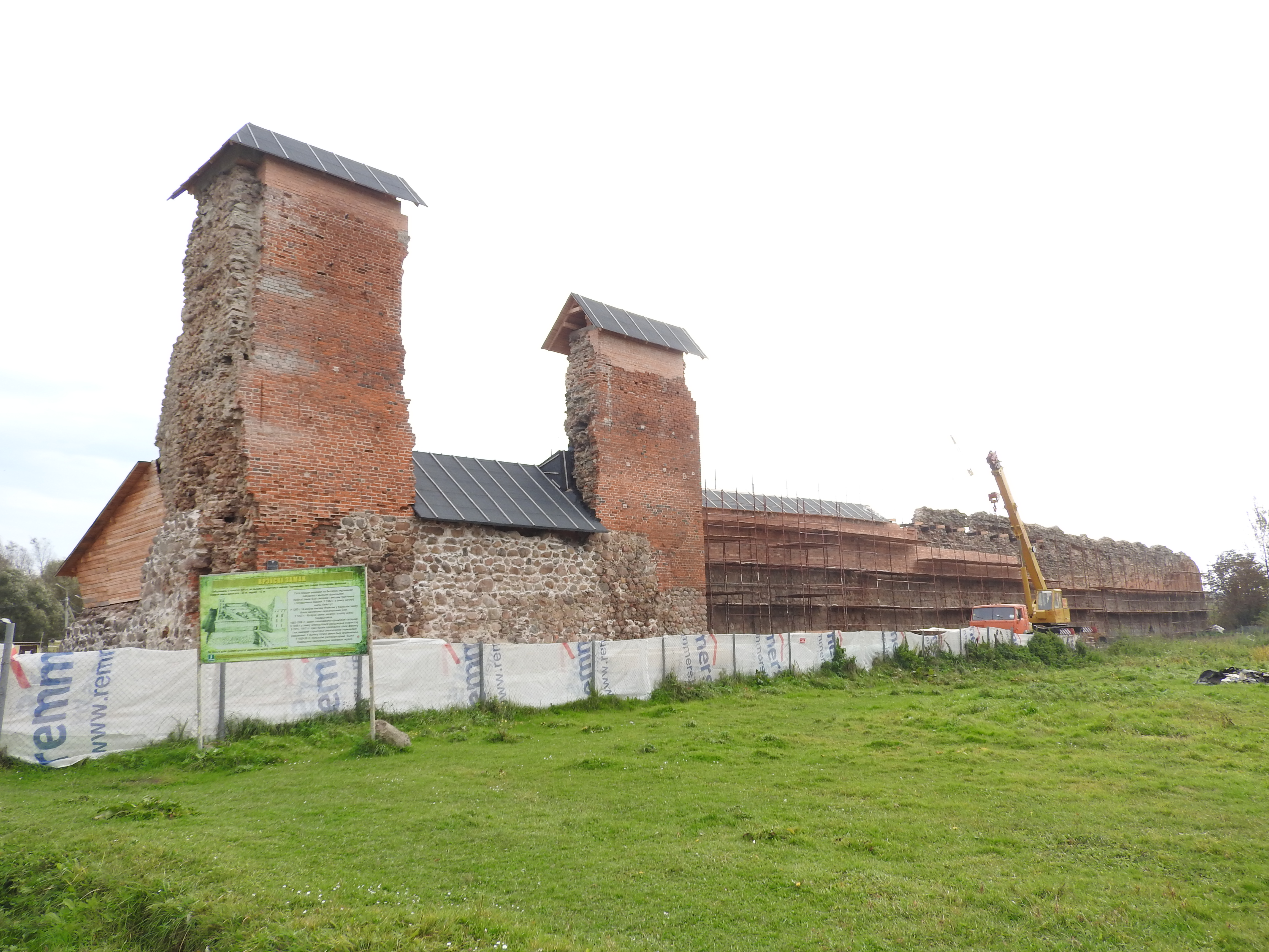 Burg Krewa, Weißrussland